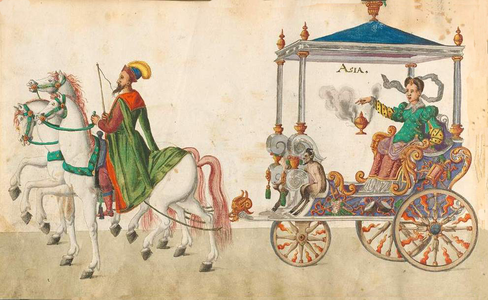 representacion simbolica del continente asiático